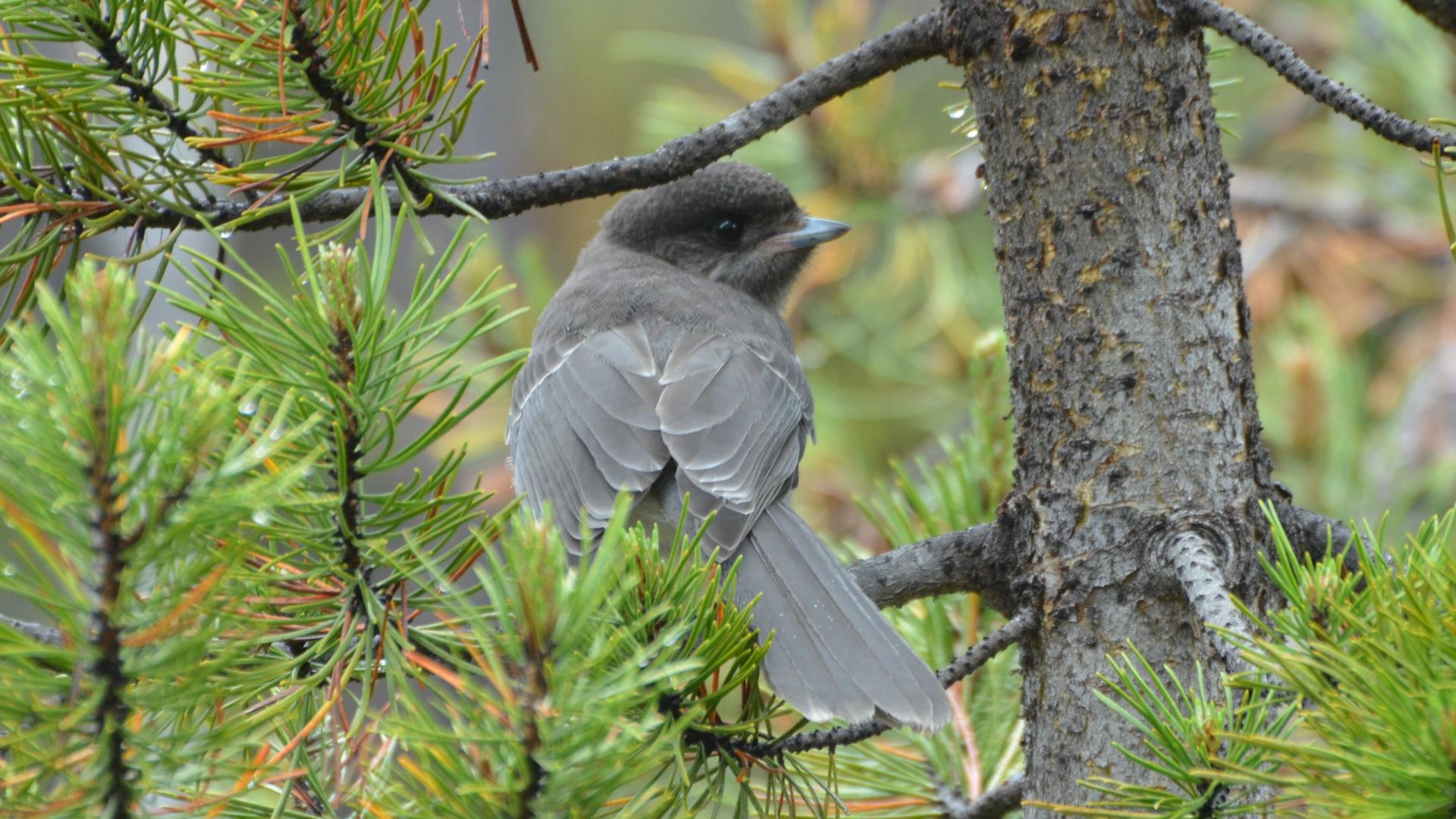 Oregon 2014